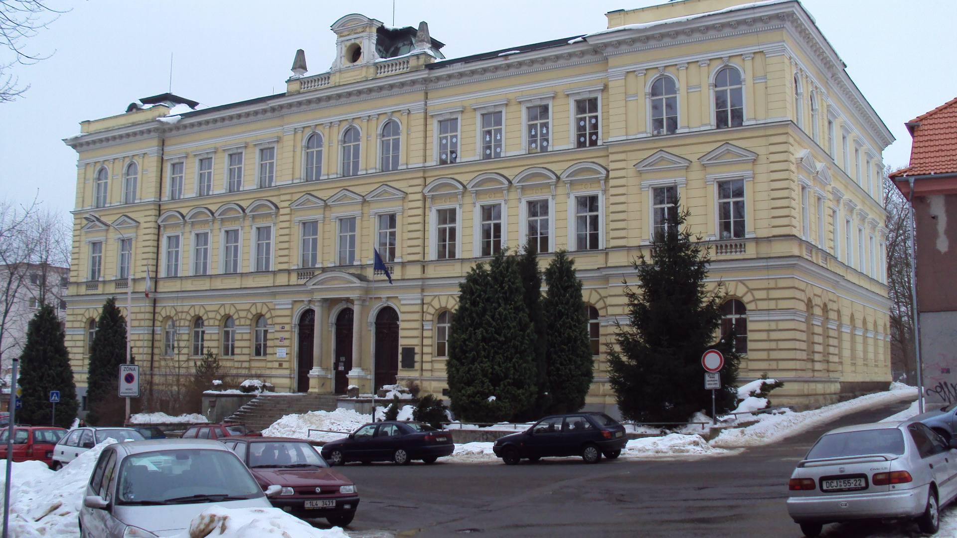 Bývalé německé gymnásium, dnes SOŠ a SOU, Palackého 545